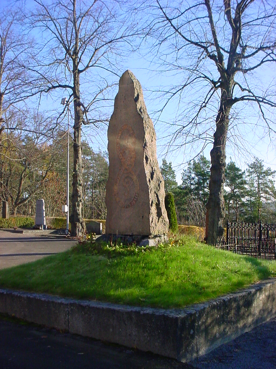 Enköping, Vårfrukyrkogården, gravvård tillhörande hovpredikanten och kyrkoherden i Enköping Arvid August Afzelius (1785-1871).